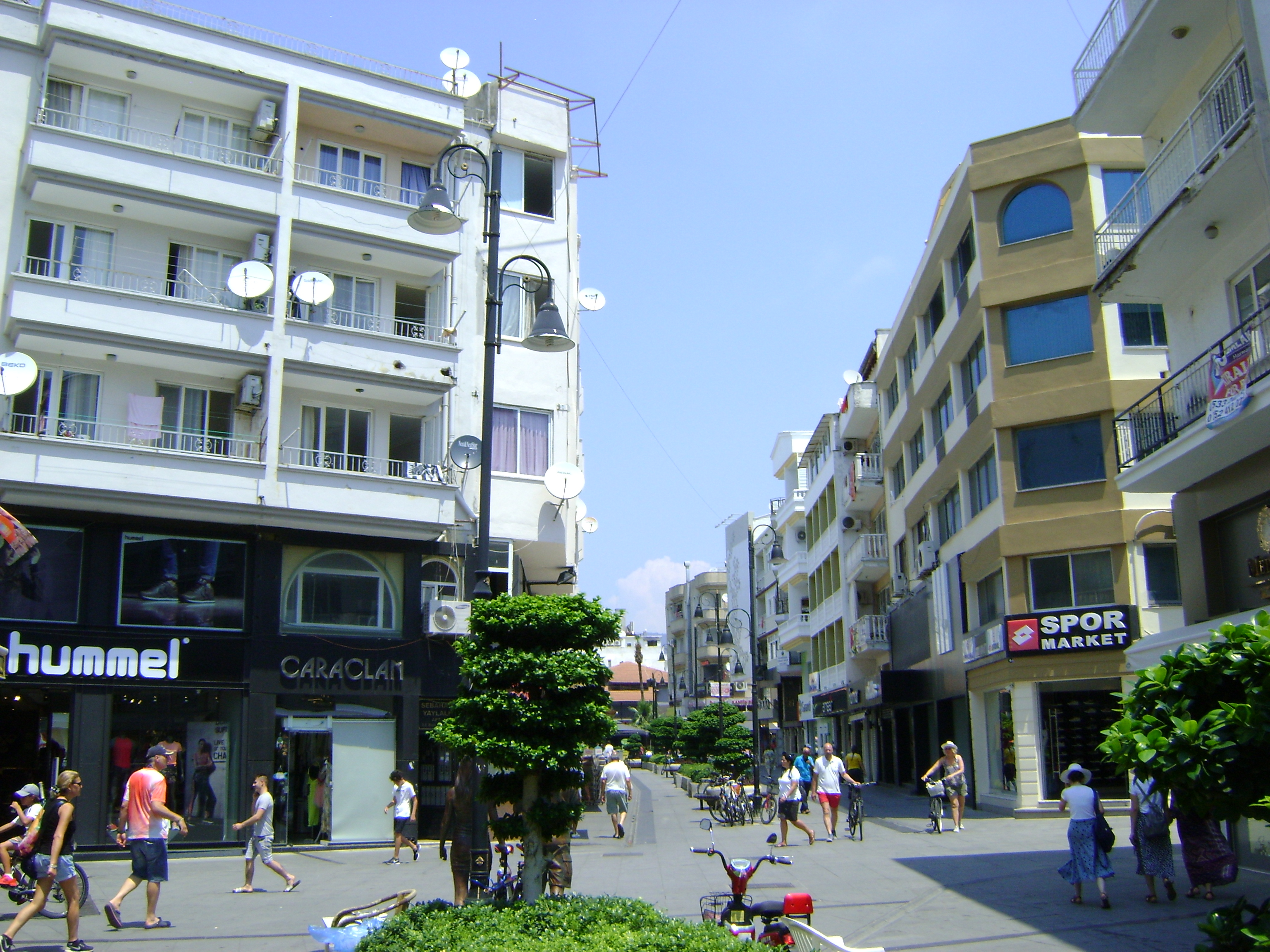 Мармарис. Туреччина. Червень 2018 р.